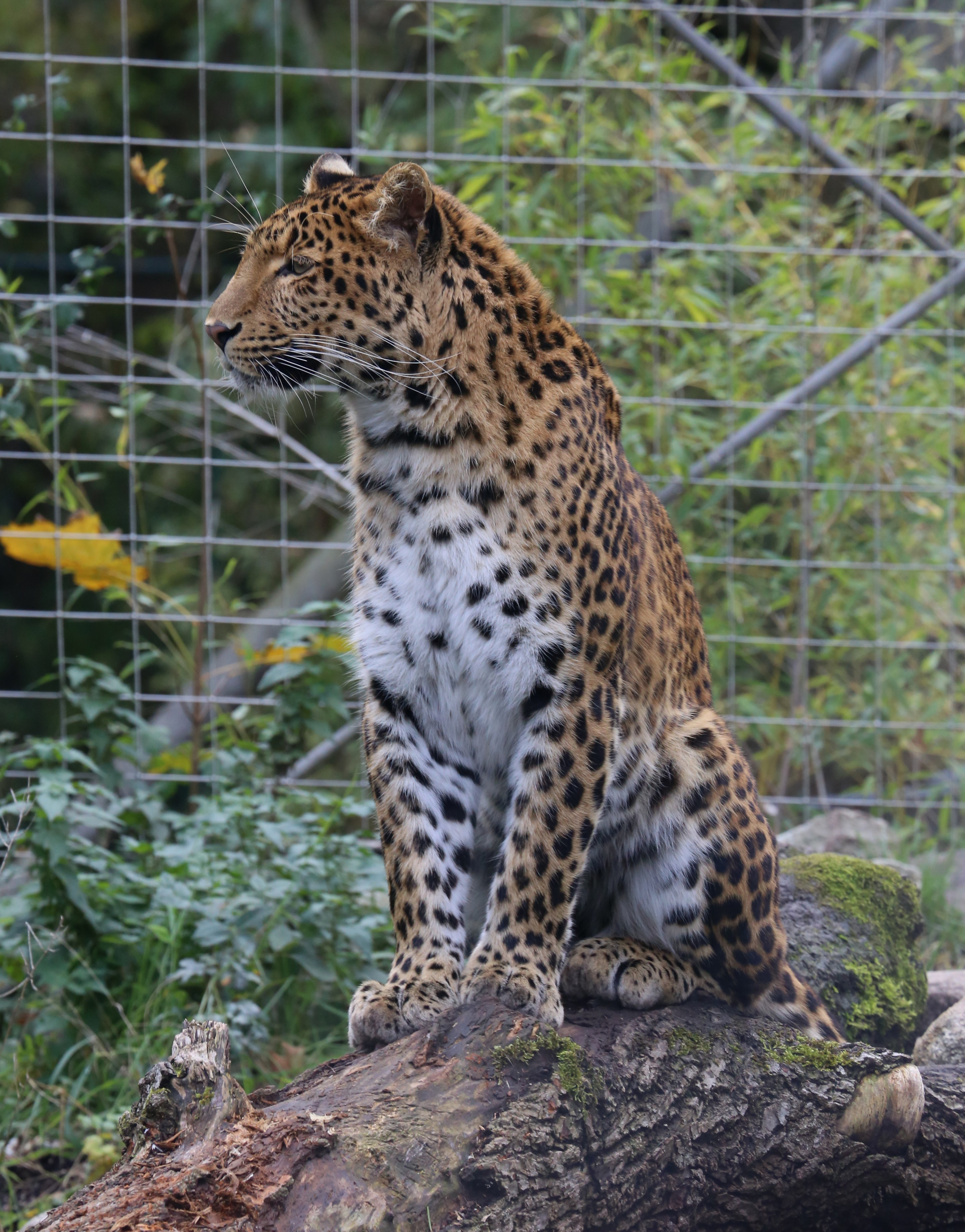 Chinesischer Leopard (Panthera pardus japonensis), Tierpark Hellabrunn, München